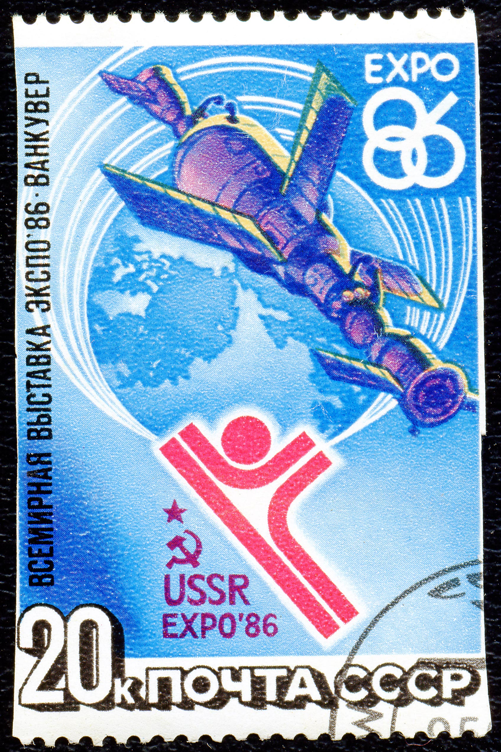 Почтовая марка СССР. 1986. Всемирная выставка Экспо-86